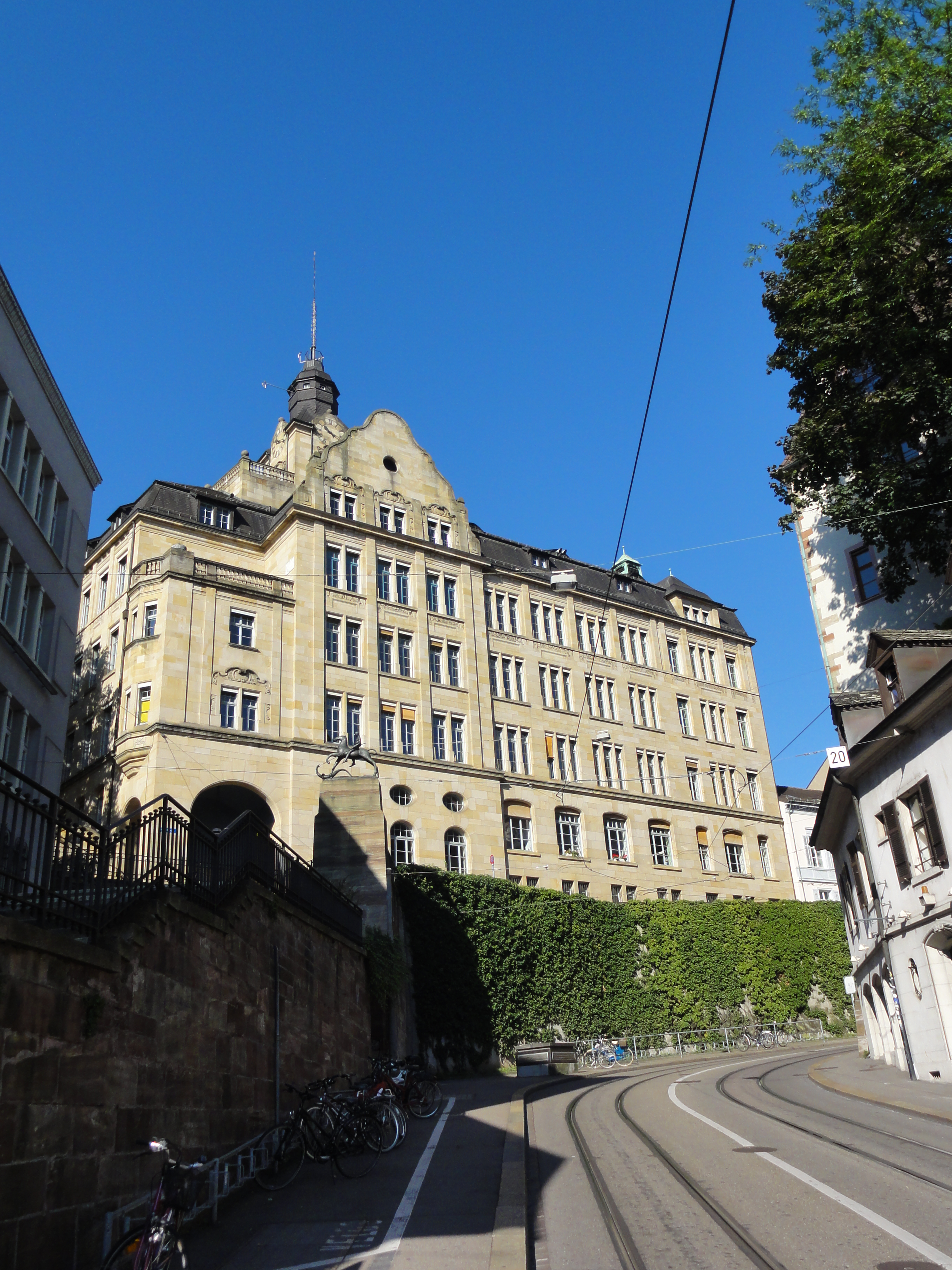 Basel Stadt — Gebäude EXIF data with GPS coordinates and magnetic direction. GPS data may be inaccurate.